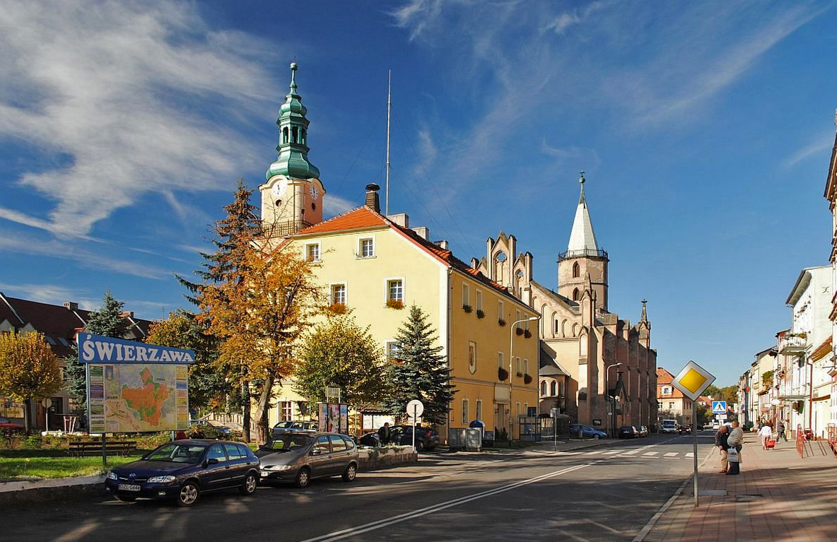 Świerzawa, ratusz, 1810, pocz. XX